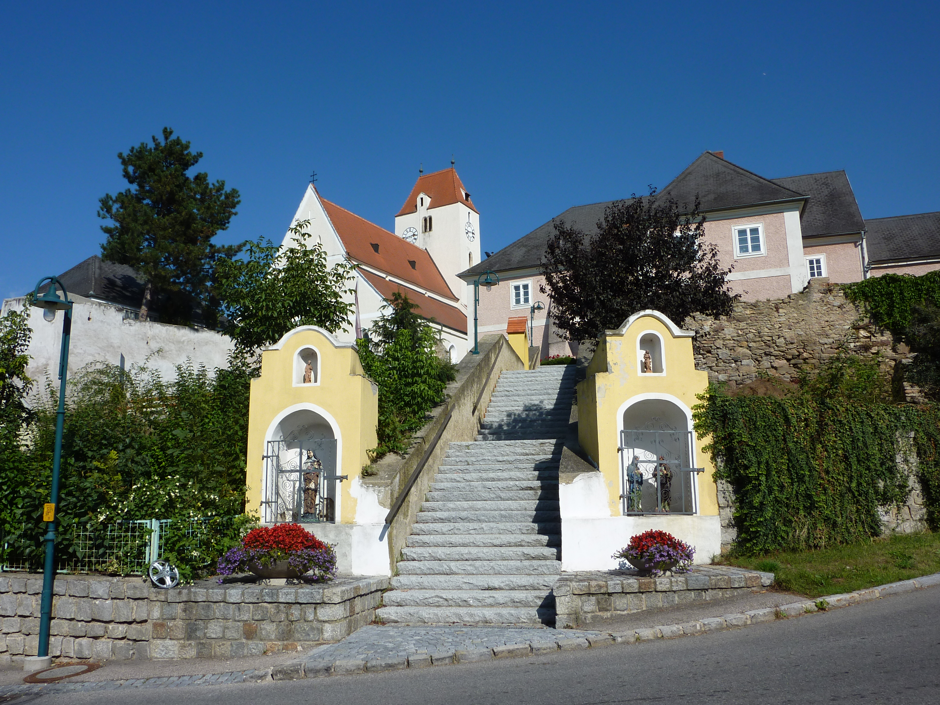 Stiegenaufgang zum ehem. Wehrkirchhof, Lengenfeld, Niederösterreich